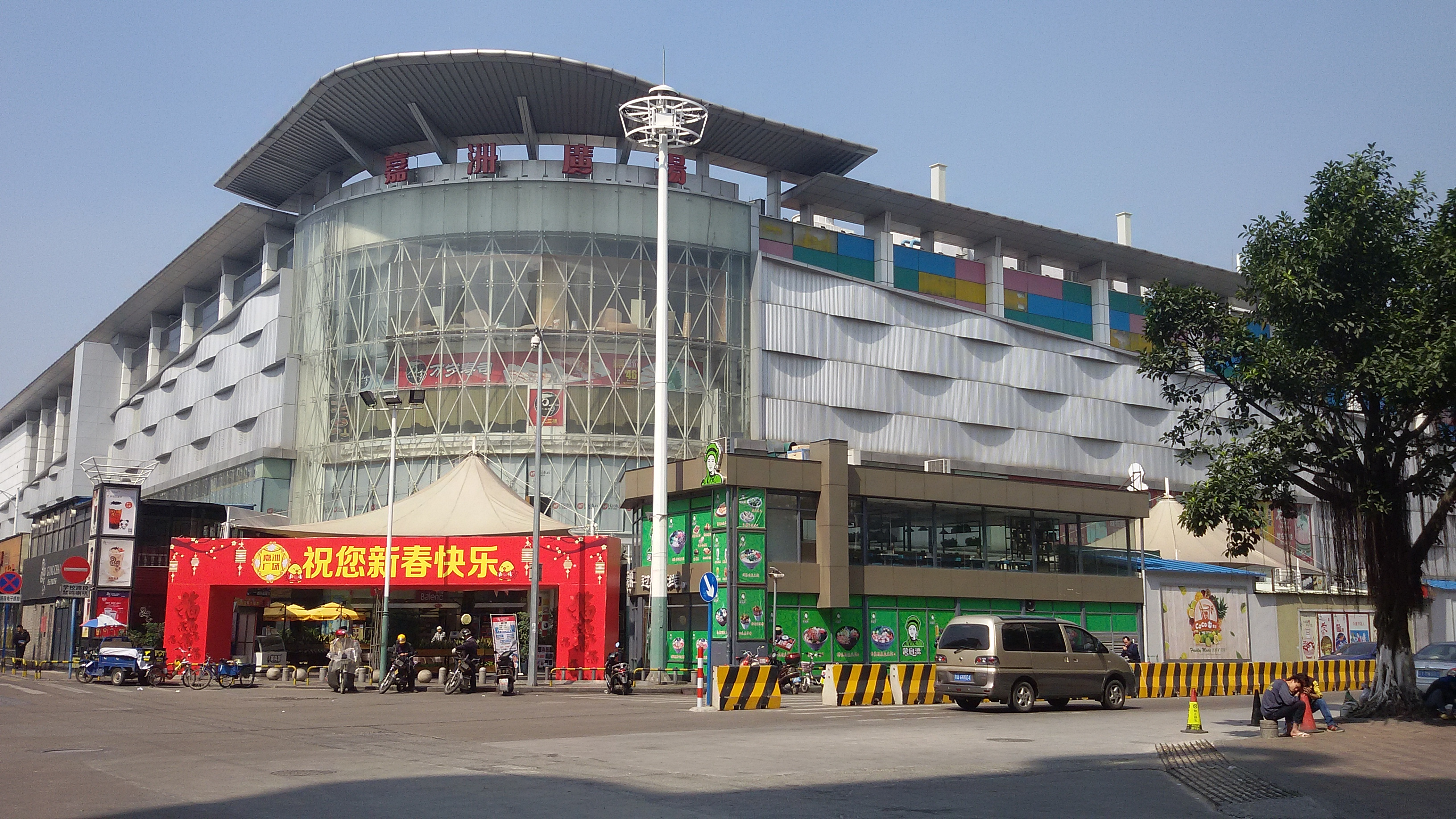 粵語: 嘉洲廣場